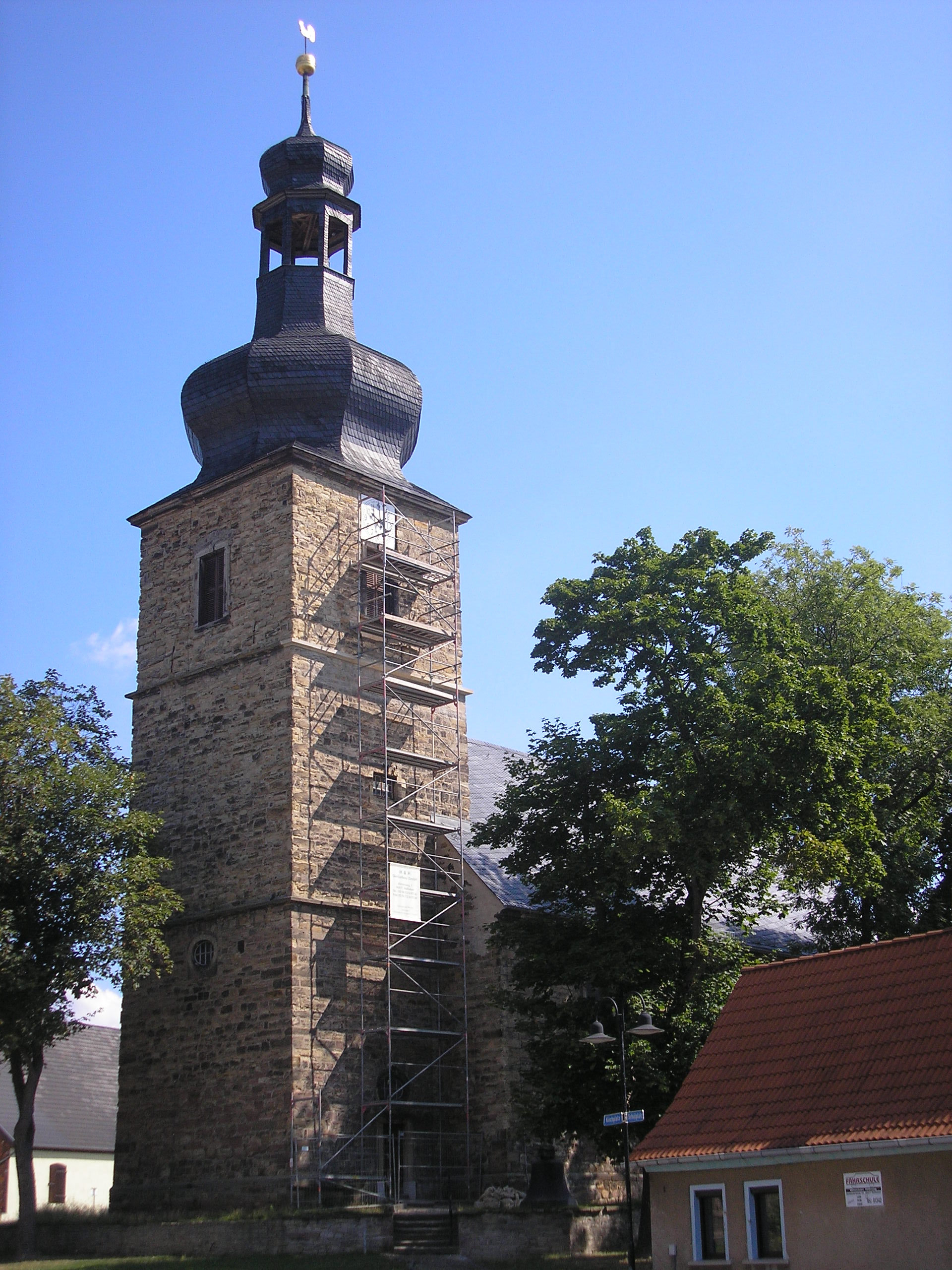 Die Kirche von Roßleben (Thüringen).